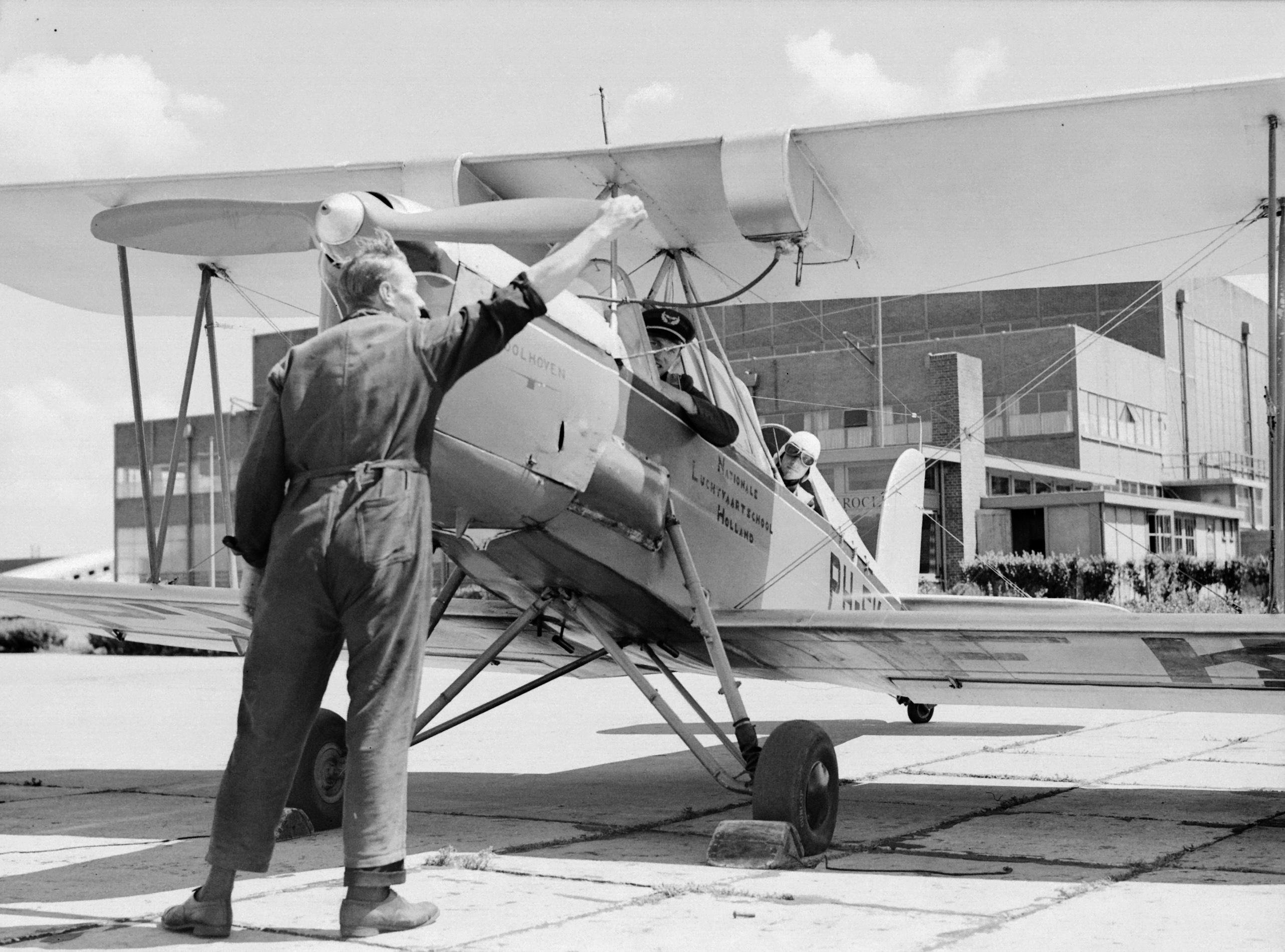 Collectie / Archief : Fotocollectie Van de Poll Reportage / Serie : Nationale Luchtvaartschool Holland Beschrijving : De mecanicien slaat de schroef aan van het Koolhoven FK-46 lesvliegtuig vanwege zijn dociele vlieggedrag bijgenaamd 'Koe of Koebeest' van de Nationale Luchtvaartschool Holland te Amsterdam Schiphol terwijl instructeur en adspirant piloot uit de cockpit leunen Annotatie : De Nationale Luchtvaart School Holland was gevestigd in Rotterdam Waalhaven en Amsterdam Schiphol Datum : 1933 Locatie : Amsterdam, Rotterdam Trefwoorden : leerlingen, leraren, monteurs, piloten, vliegopleidingen, vliegtuigen Persoonsnaam : Frits Koolhoven Fotograaf : Poll, Willem van de Auteursrechthebbende : Nationaal Archief Materiaalsoort : Negatief (zwart/wit) Nummer archiefinventaris : bekijk toegang 2.24.14.02 Bestanddeelnummer : 255-8625